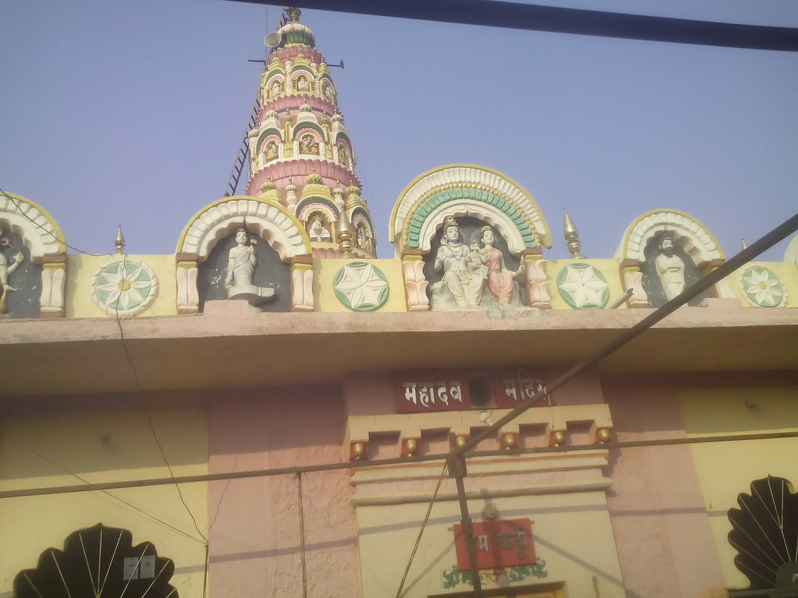 खूप सुंदर नक्षीकाम करण्यात आले आहे.